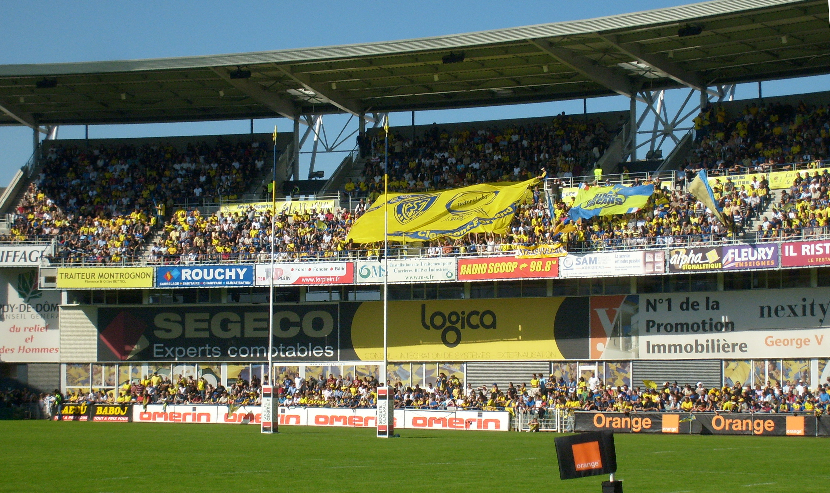 Les supporteurs de l'ASM Clermont Auvergne dans la tribune Phliponeau du Stade Marcel Michelin de Clermont-Ferrand.